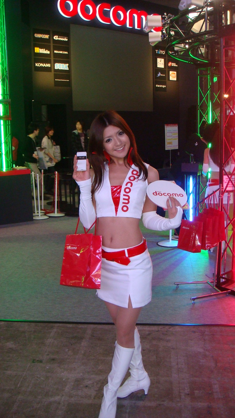 中文（台灣）: 2008東京電玩展，NTT docomo攤位的宣傳模特兒。